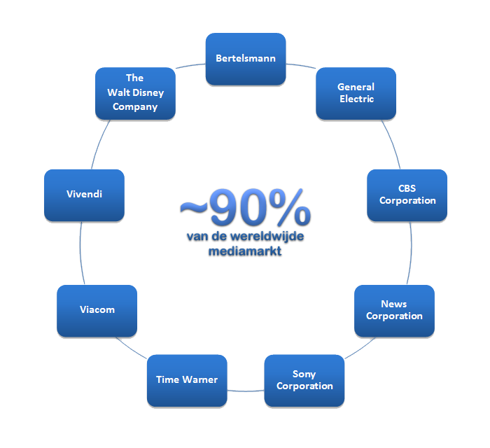 Zelfgemaakt.